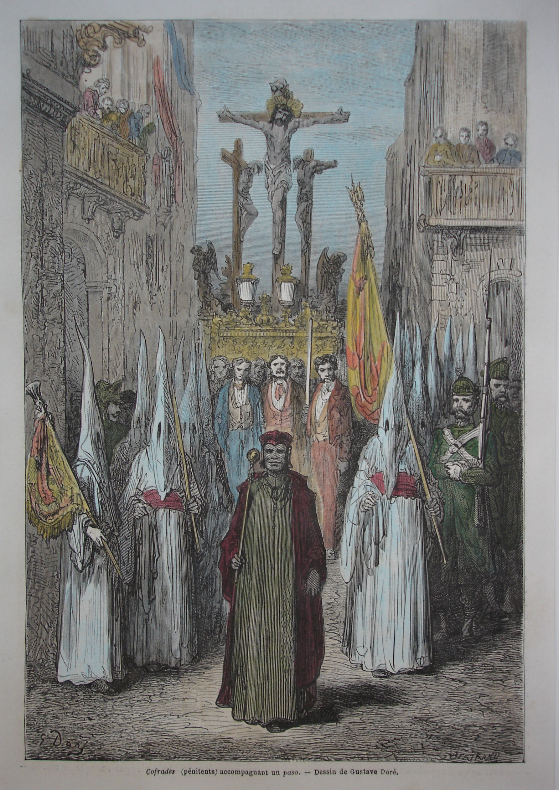 Cristo de la Conversión del Buen Ladrón. Hermandad de Montserrat. Sevilla, Andalucía, España.